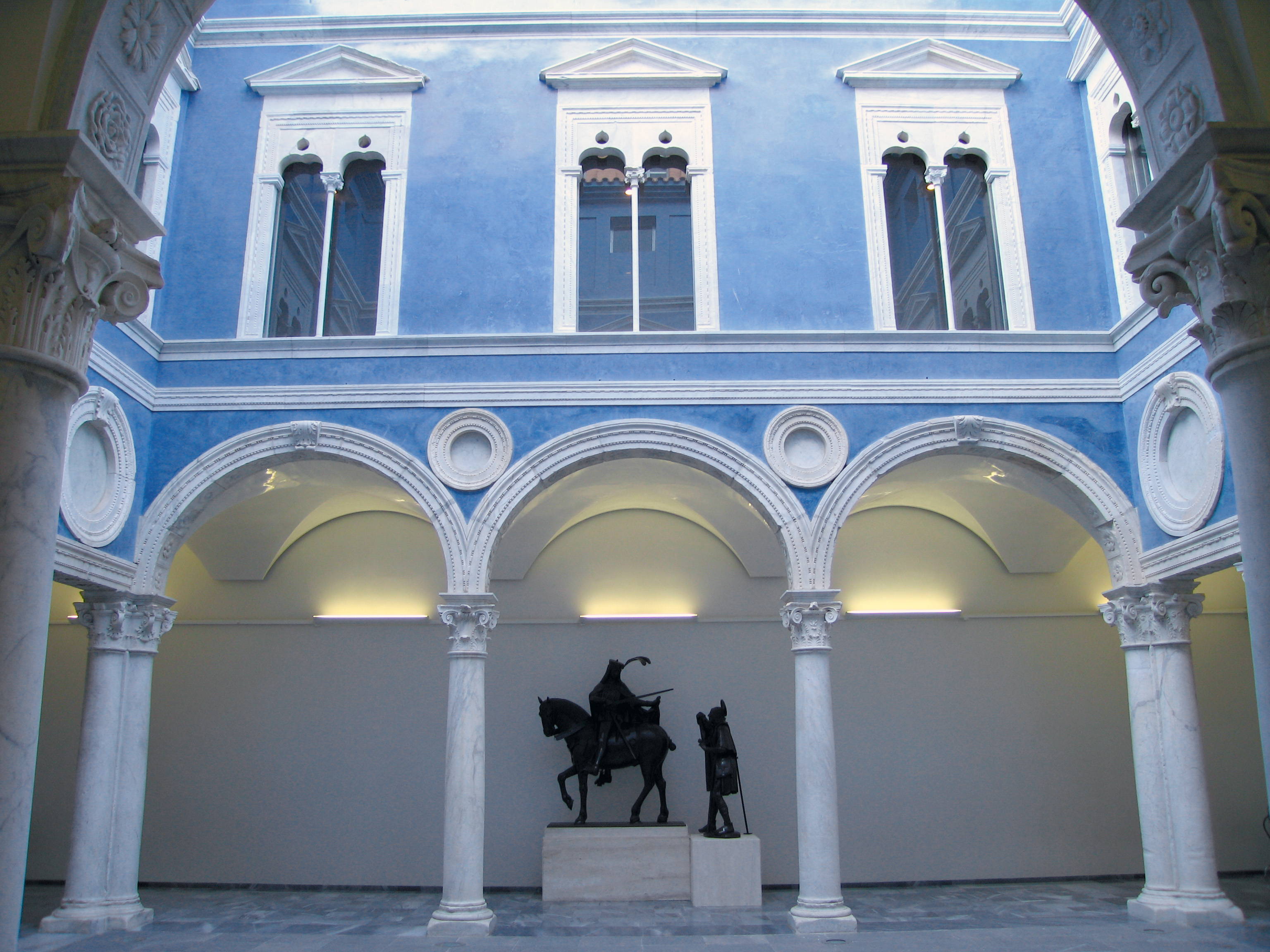 Pati de l'Ambaixador Vich, sant pius V (València)